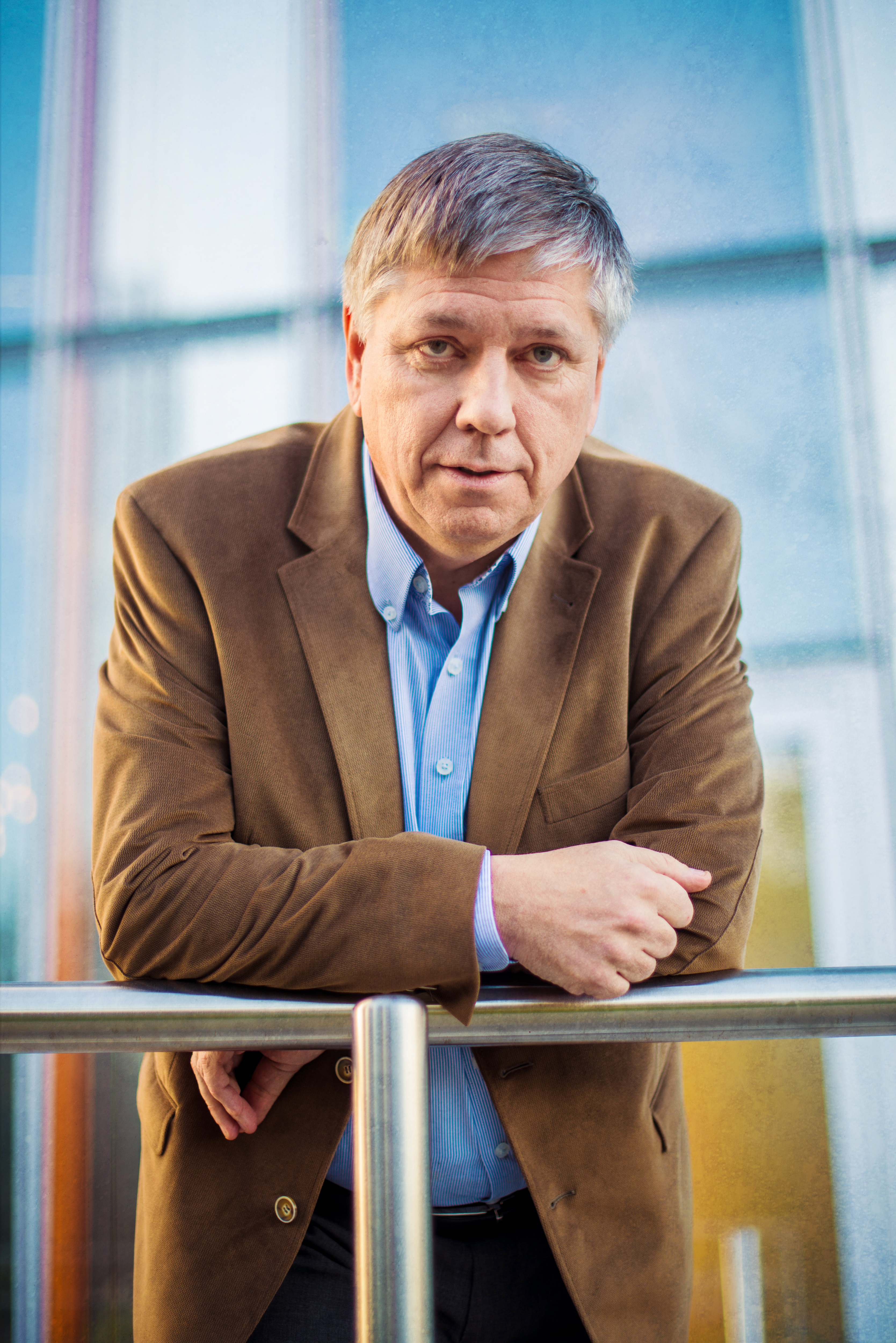 Jo Vandeurzen